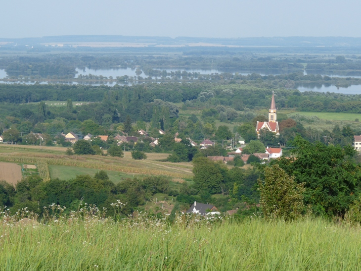 Vue panoramique depuis la colline